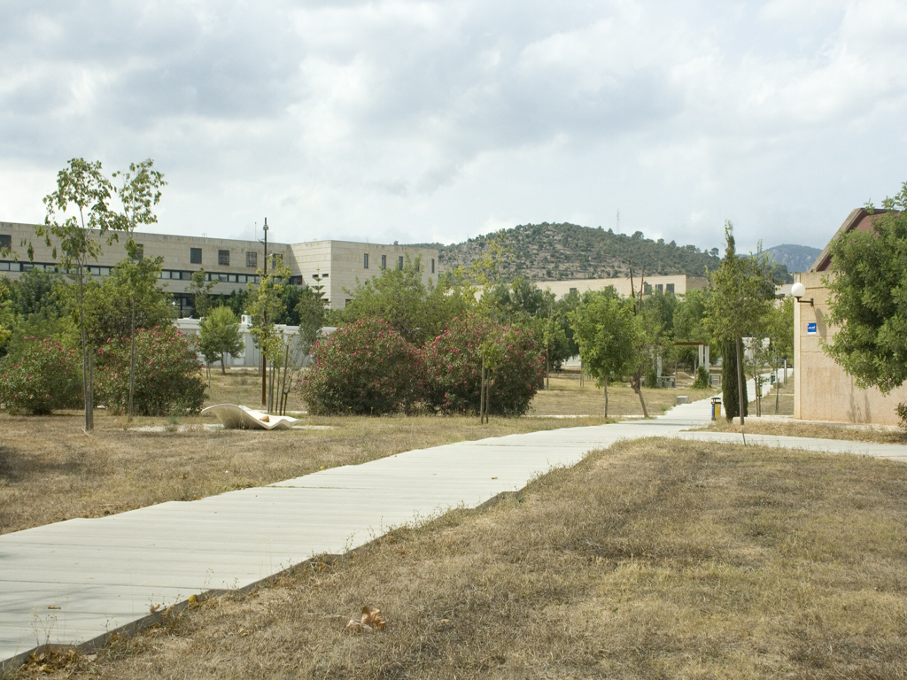 Parc de la UIB